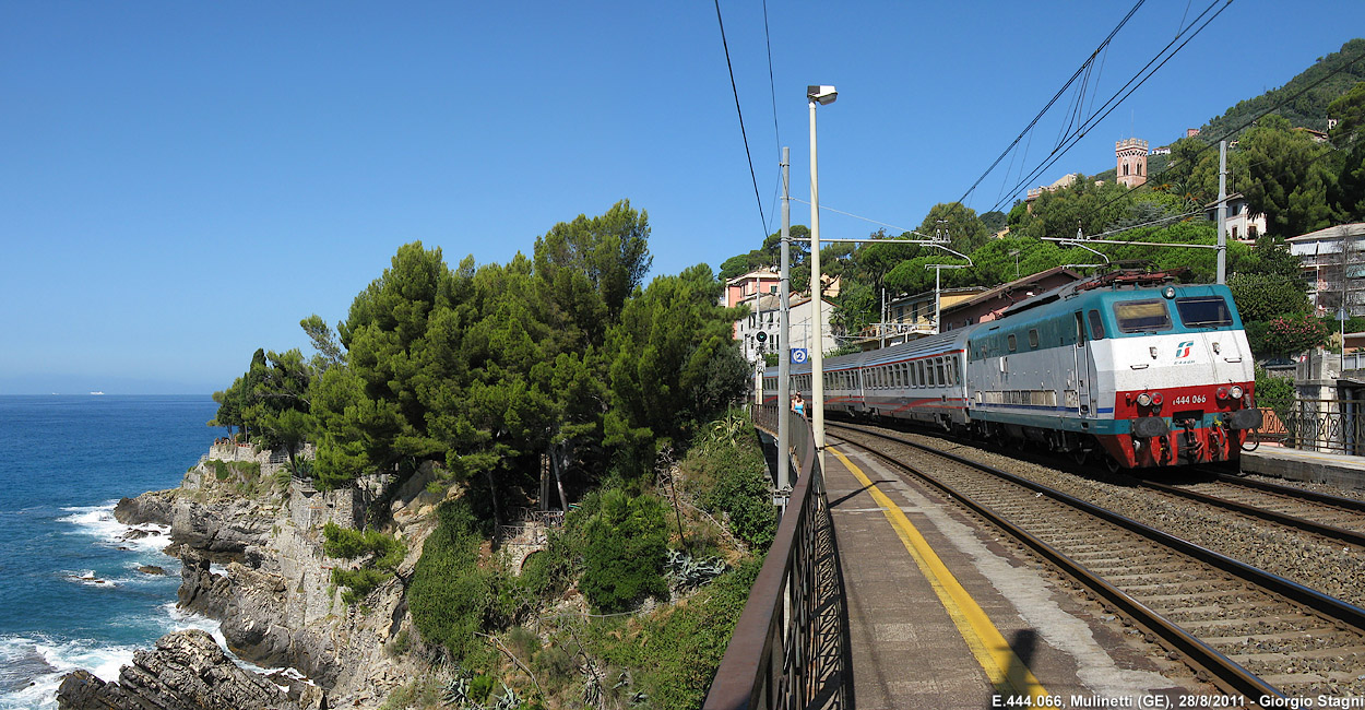 Stazione ferroviaria di Mulinetti, è in transito un treno trainato dalla locomotiva E.444.066.